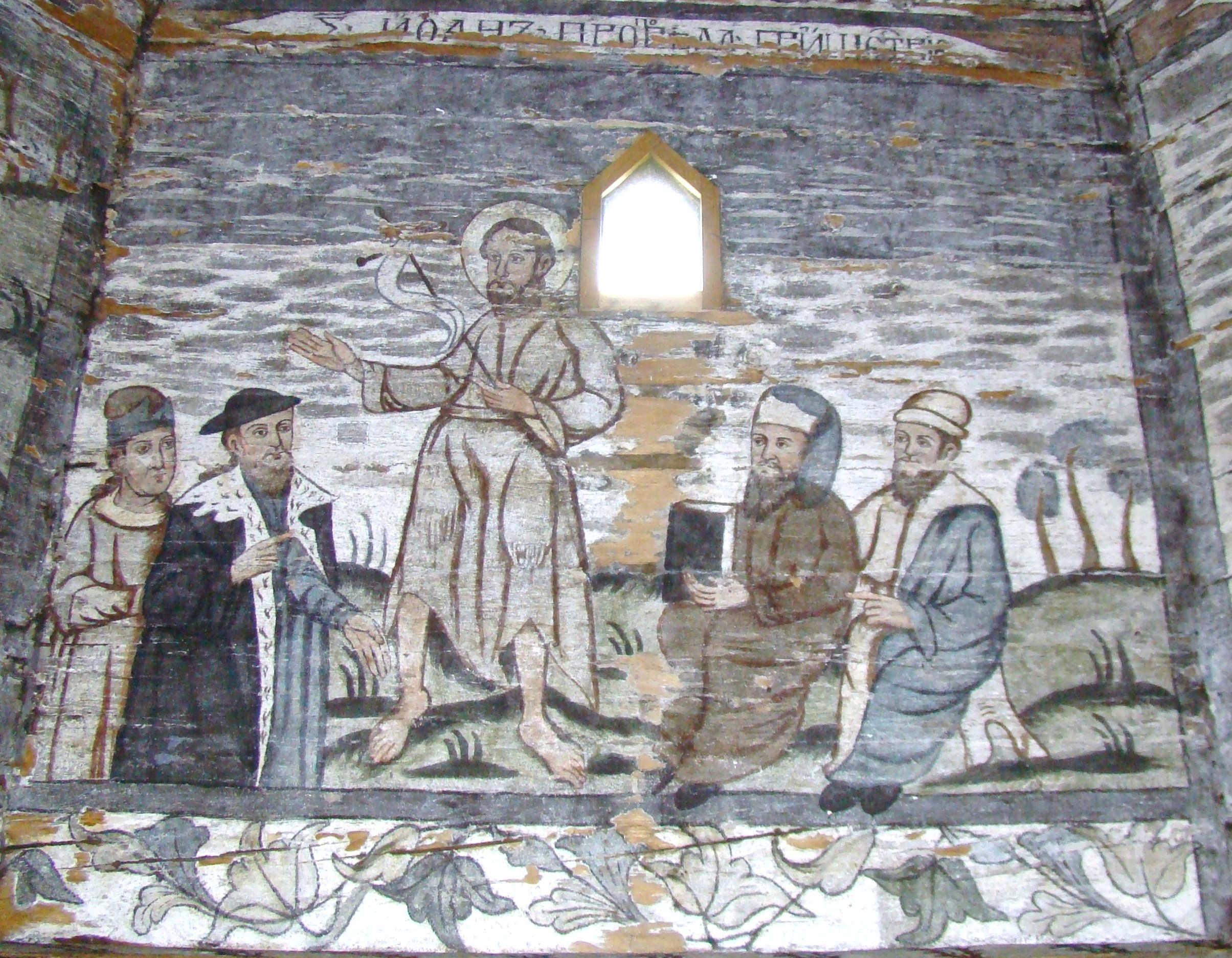 Biserica de lemn "Sfântul Nicolae", sat BOGDAN VODĂ